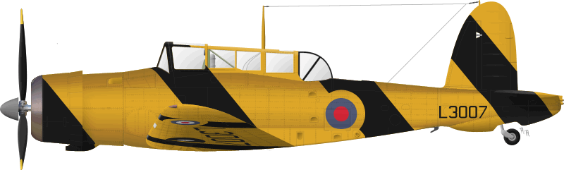 Blackburn Skua Mk.II in Target Tug markings